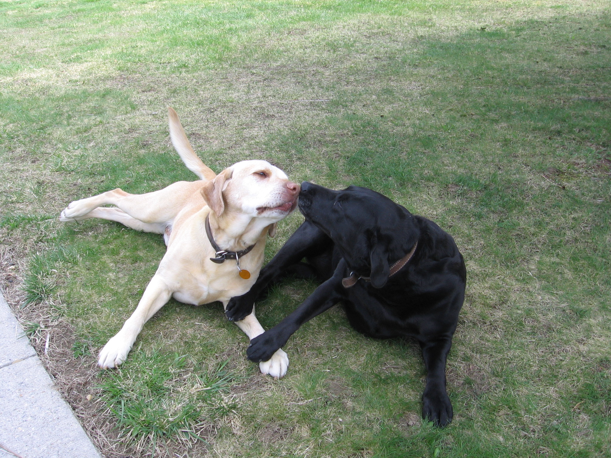 Two Labrador Retrievers